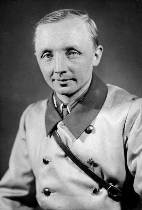 Dr. Johannes von Leers Scherl: Dr. Johann von Leers schrieb das Manuskript zu den "Politischen Dialogen", die im Deutschlandsender vorgetragen werden. 300079-33 Aufnahme: Alexander Bengsch, Berlin [Porträt; 1933] Abgebildete Personen: Leers, Johann von Prof. Dr.: Reichsschulungsleiter des Deutschen Studentenbundes, Schriftsteller, Deutschland (GND 116854804)